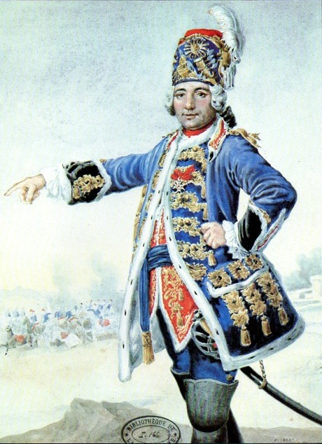 Simon Claude de Glatigny de Grassin en uniforme de colonel des arquebusiers, le tableau original est de M.Liébault et se trouve au Musée de l'Armée de Paris.